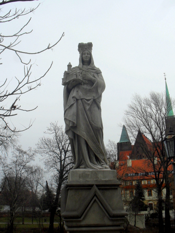 Wrocław, Most Tumski, 1888-1889